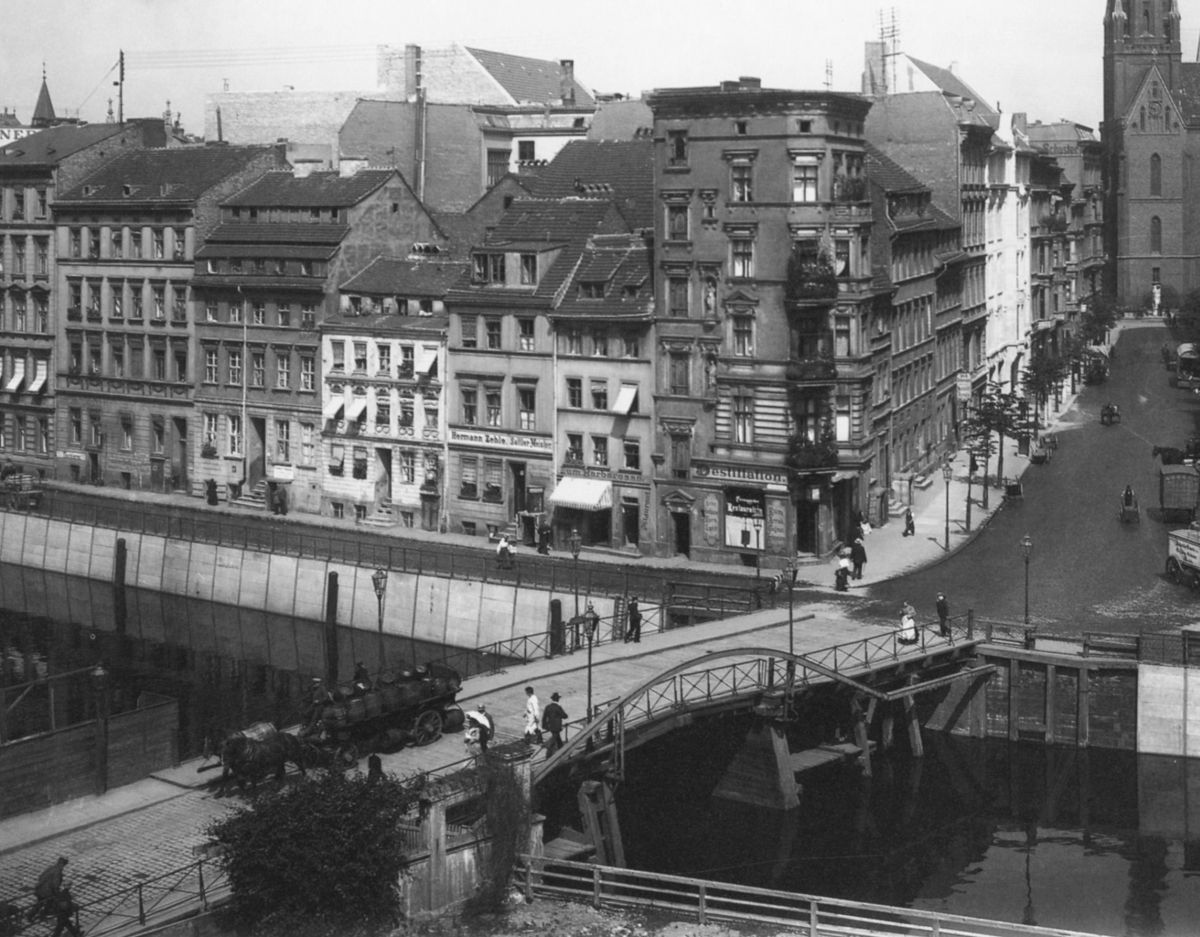 Berlin. Grünstraßenbrücke über den Spreekanal.